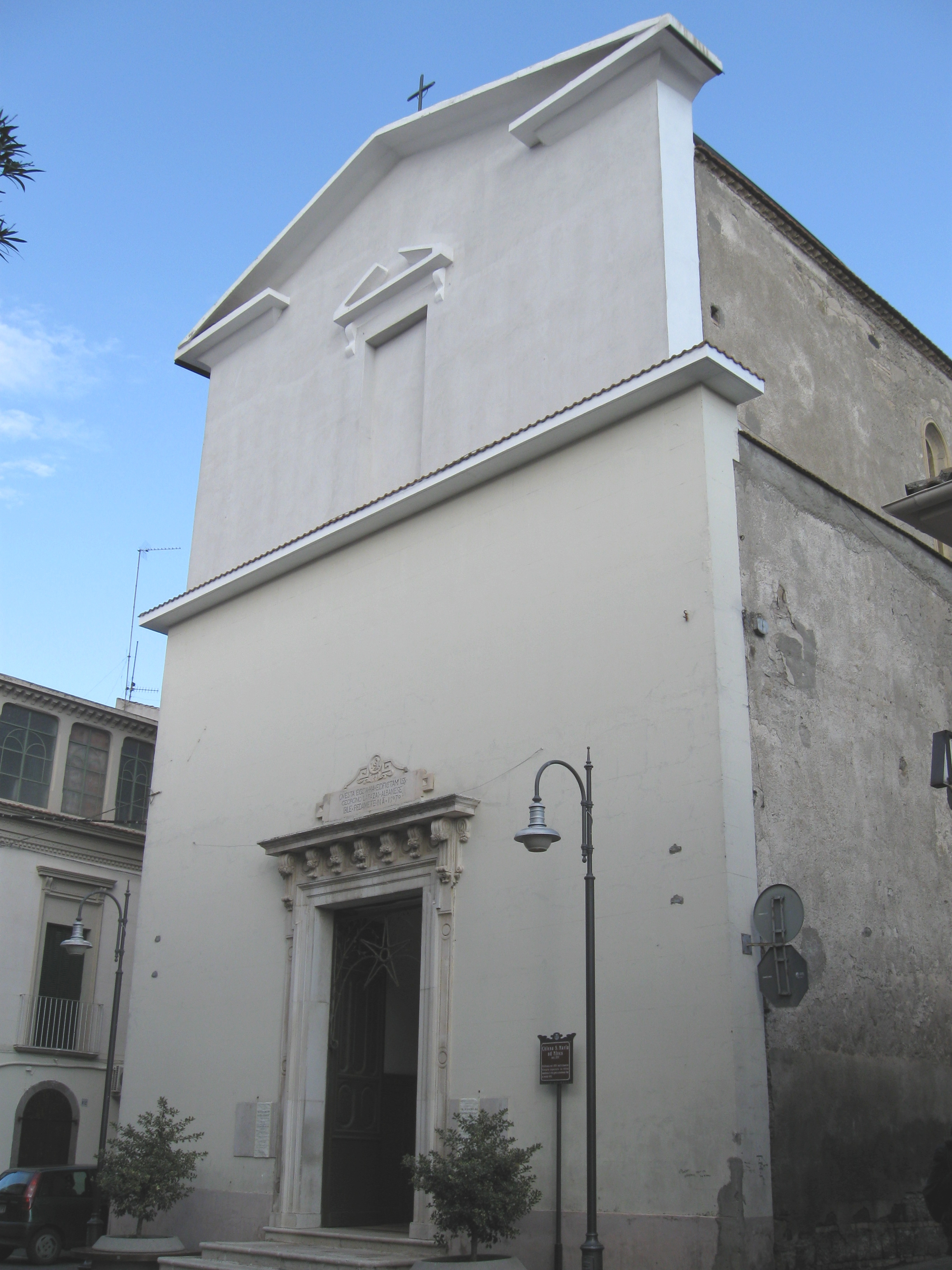 Chiesa Santa Maria ad Nives, Melfi, Basilicata